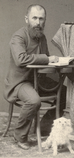 ლექსანდრე როინაშვილი